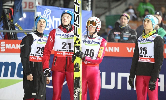 Konkurs indywidualny mężczyzn na skoczni K-120 podczas Mistrzostw Świata w Narciarstwie Klasycznym 2013